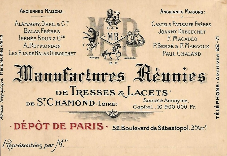 Saint-Chamond (Loire), Manufactures Réunies de Tresse et Lacets (après 1898).